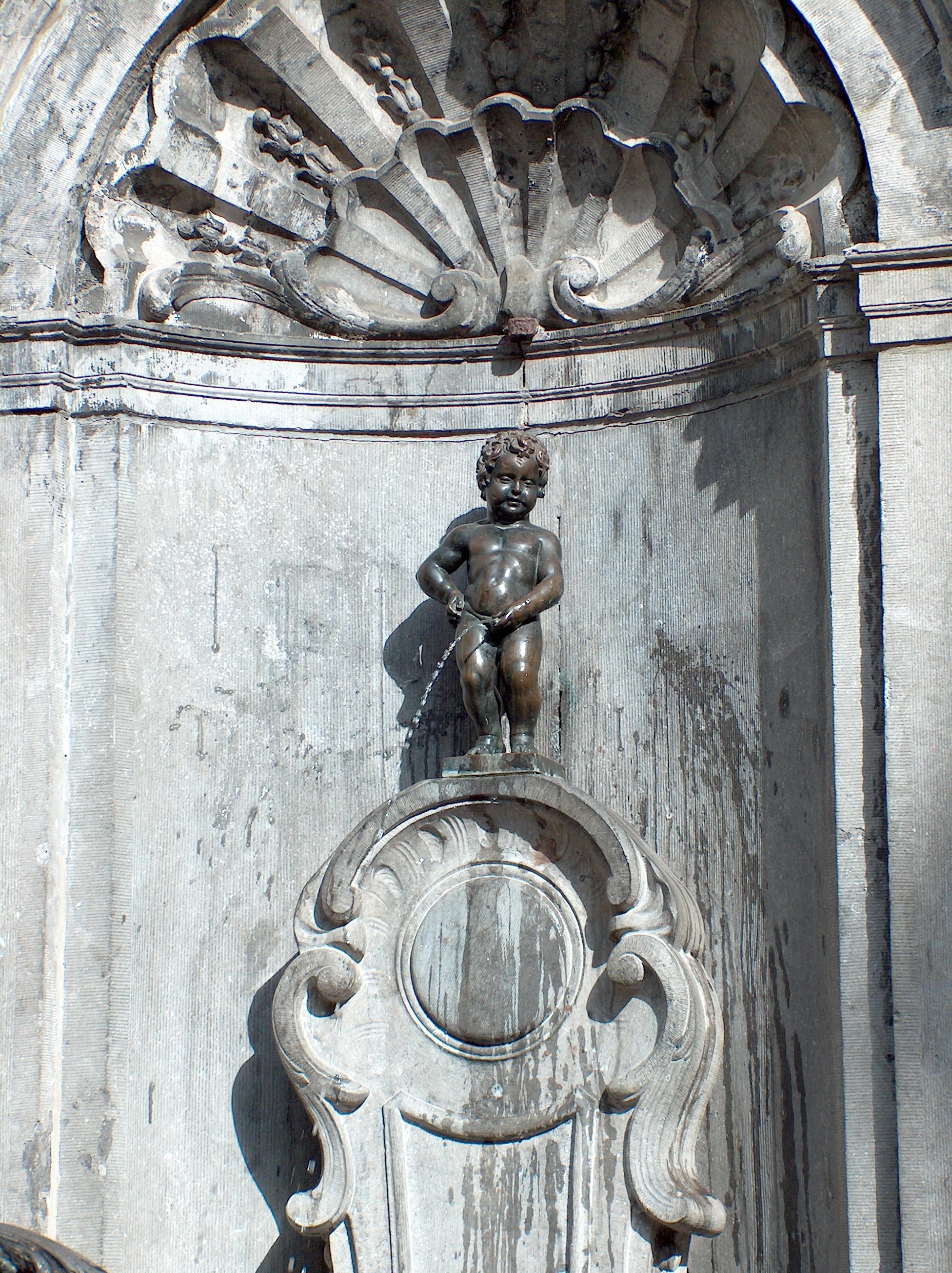 Manneken Pis van Brussel